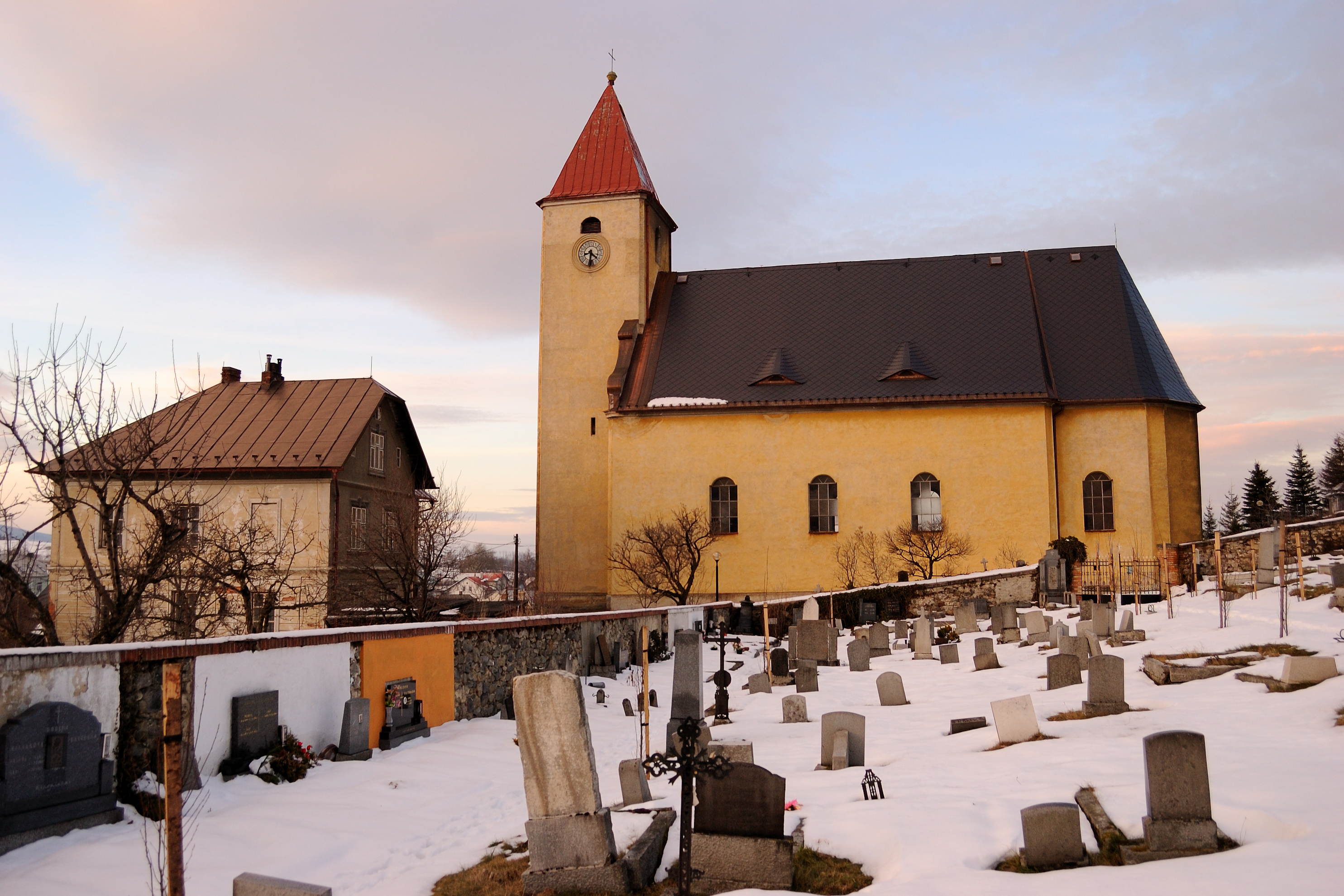 Kostel sv. Filipa (Vápenná), Vápenná